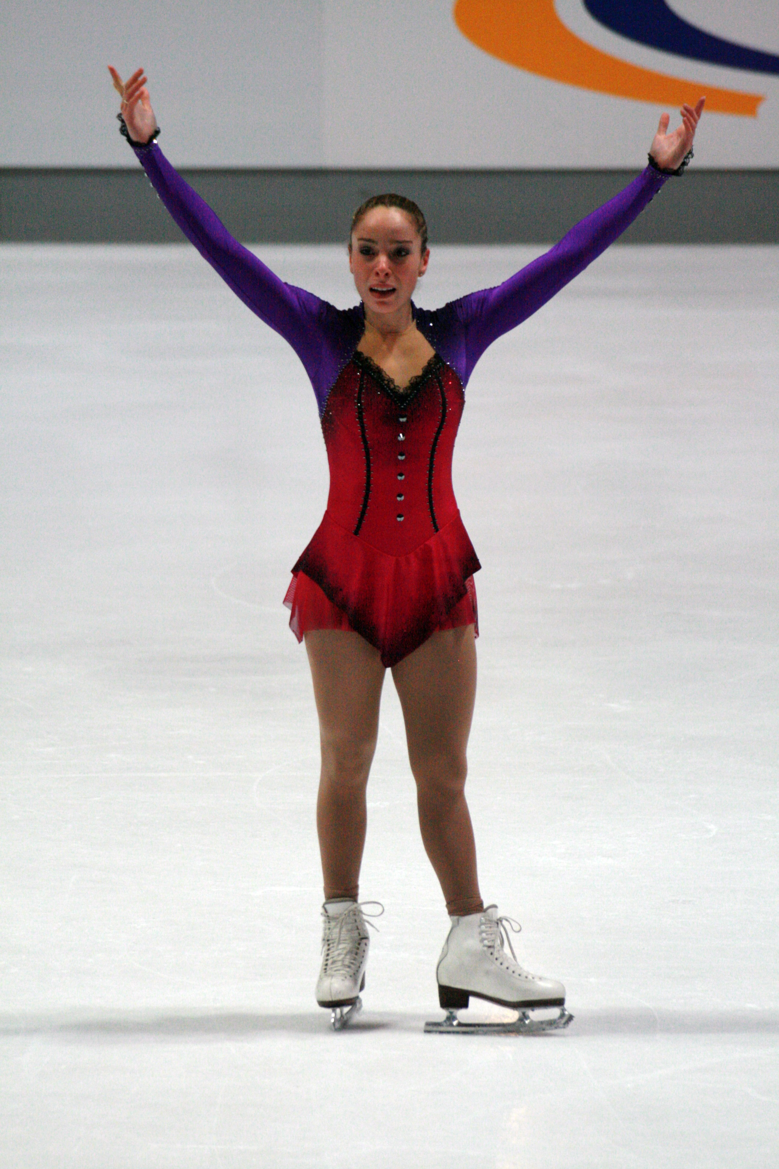 Даниэль Монтальбано (Израиль) на 2013 Nebelhorn Trophy.